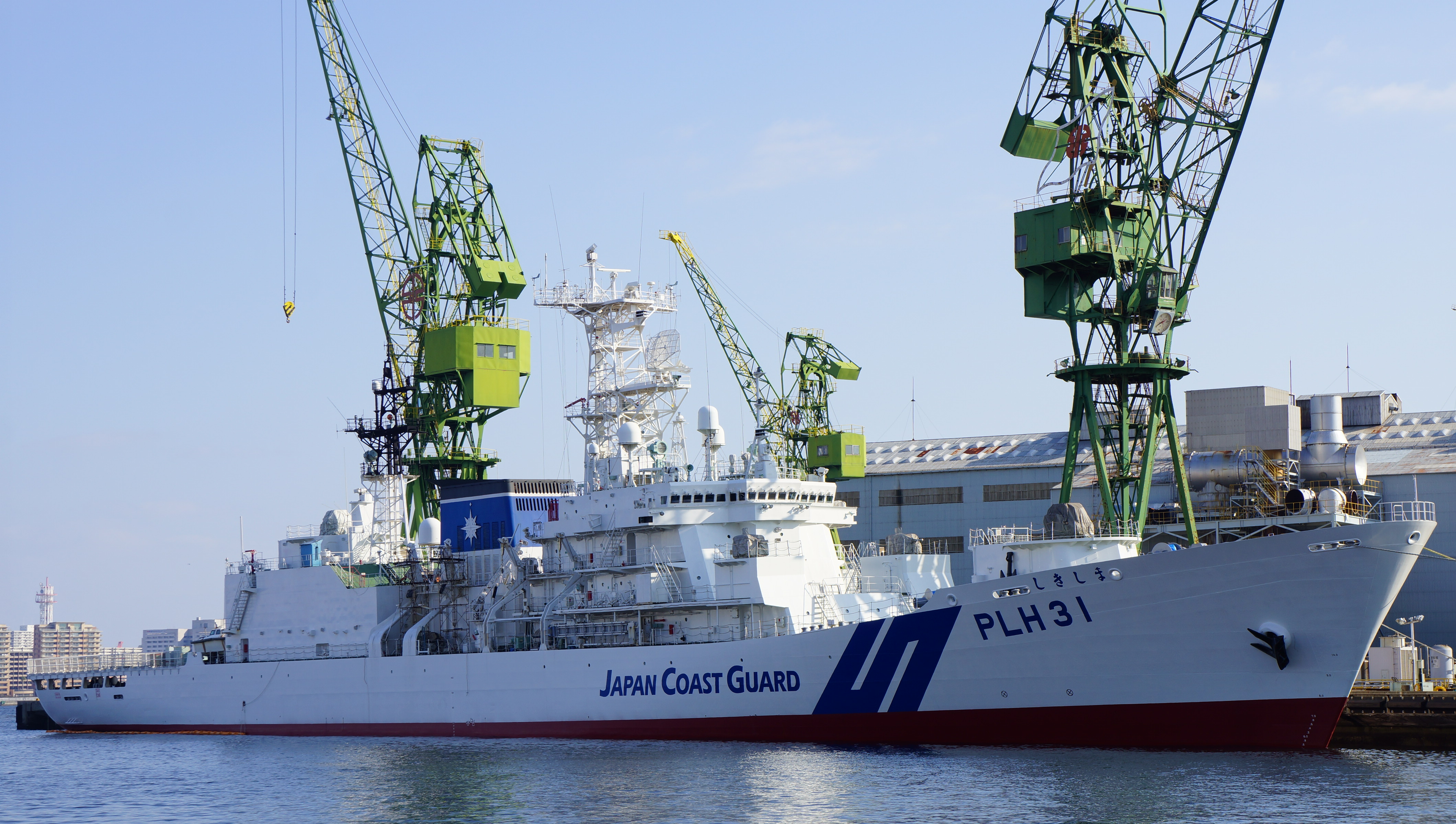 海上保安庁 巡視船しきしま（PLH-31） 12年12月16日 川崎造船神戸工場にて停泊中